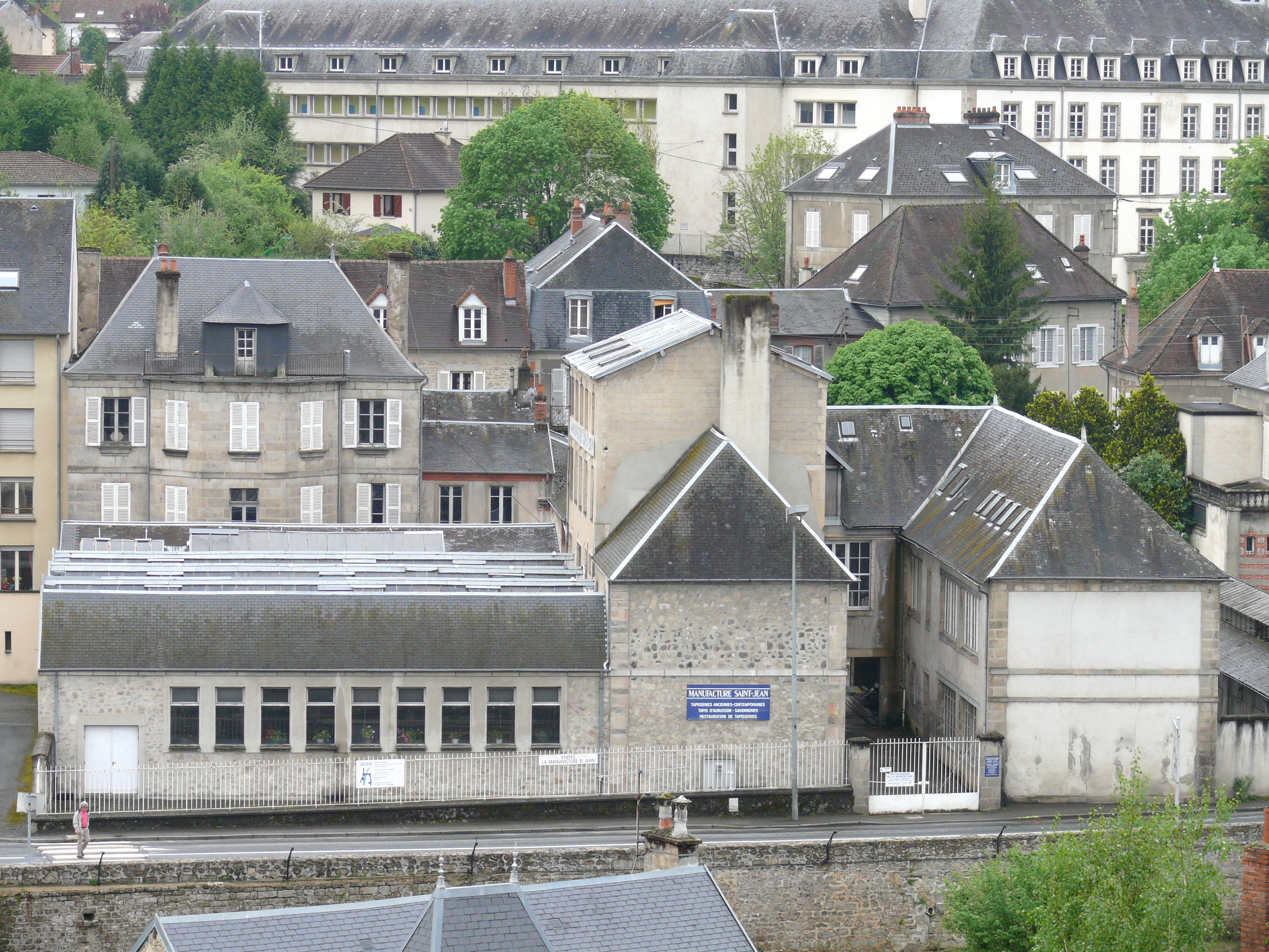 Aubusson - Manufacture Saint-Jean, avenue de Lissiers